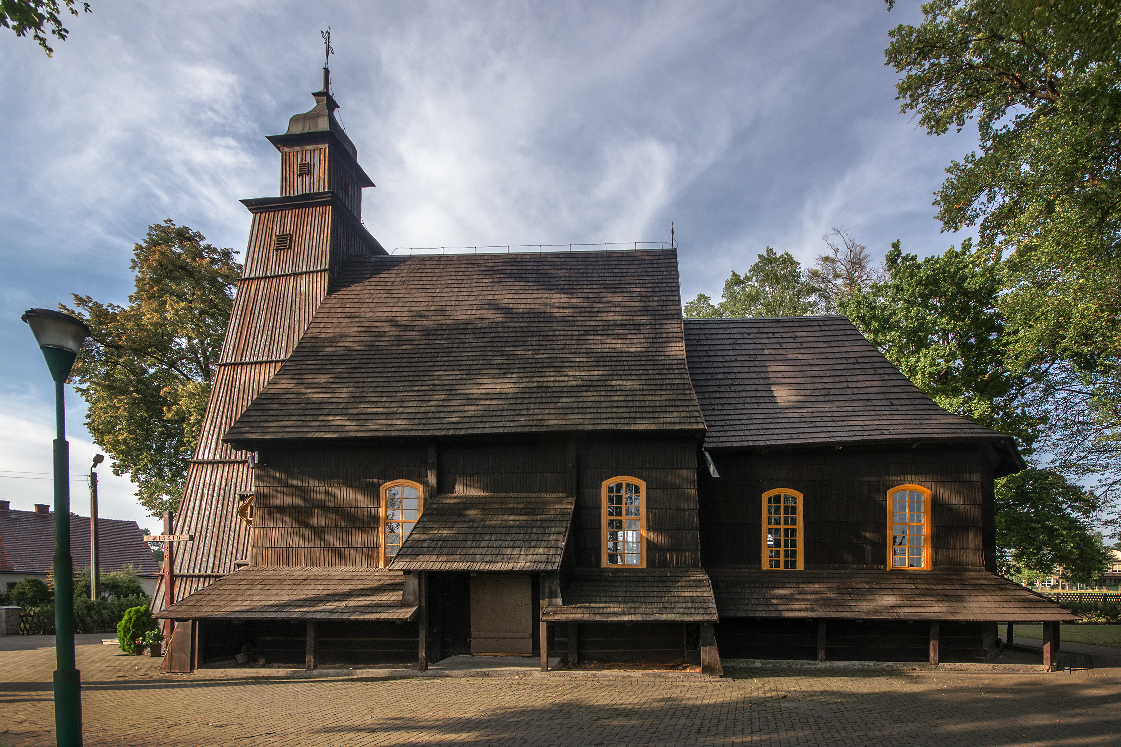 Wachów, kościół fil. pw. św. Wawrzyńca, 1706